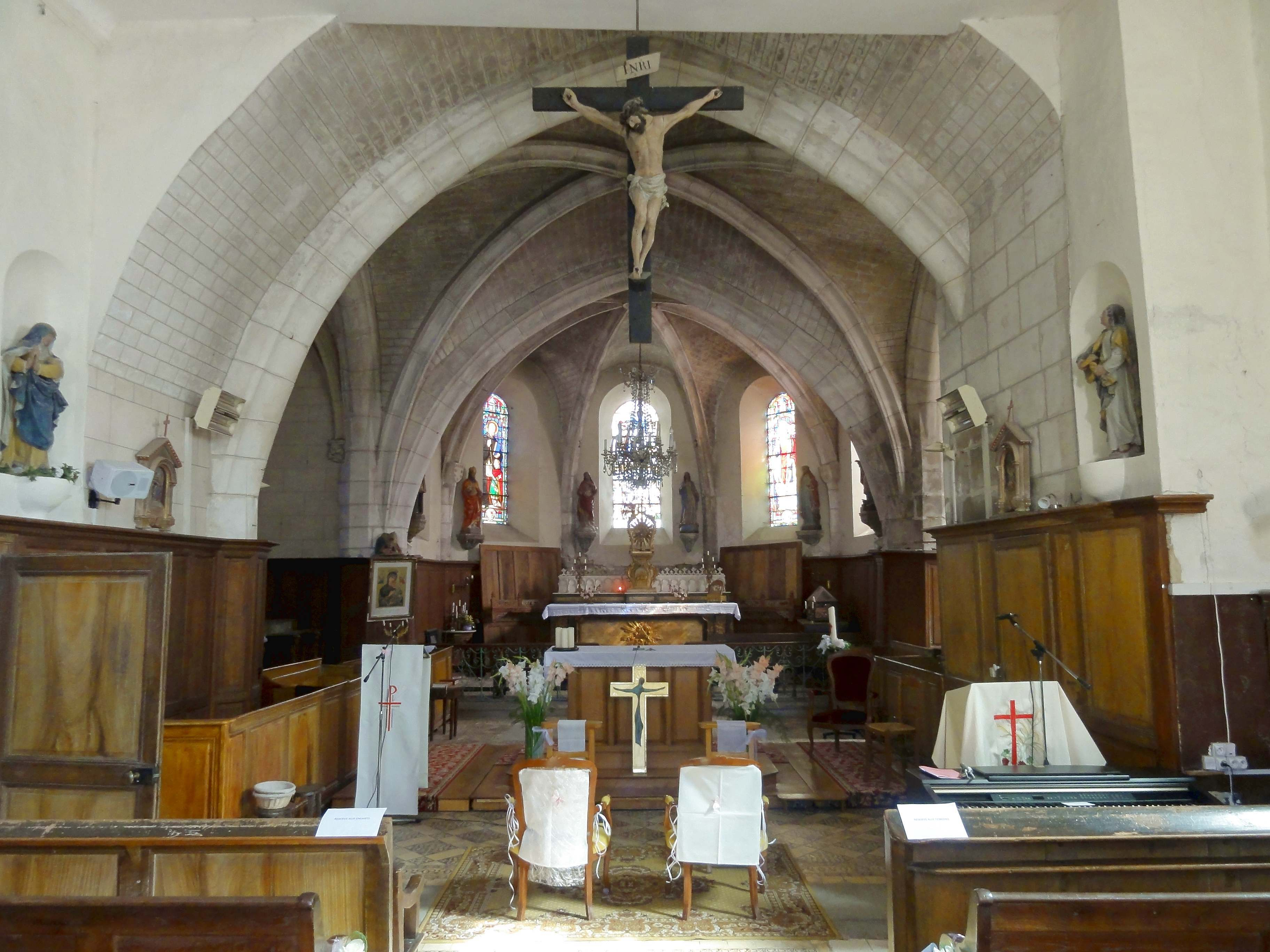 Intérieur de l'église - voir titre.